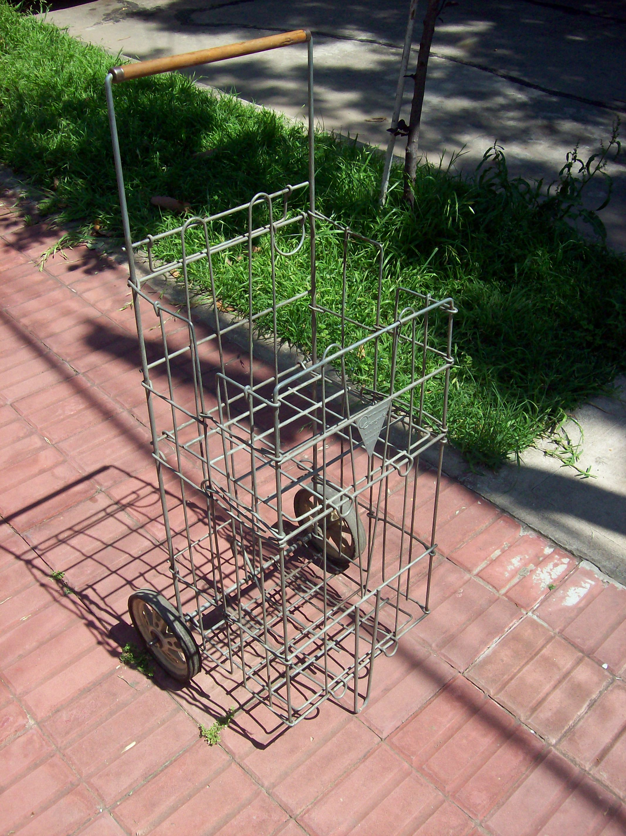 Auténtico changuito marca "Changuito", Argentina. (solamente las ruedas NO son las originales). Los dos niveles son rebatibles. Tenía también una tela alrededor que impedía que las cosas se saliesen por entre el armado.